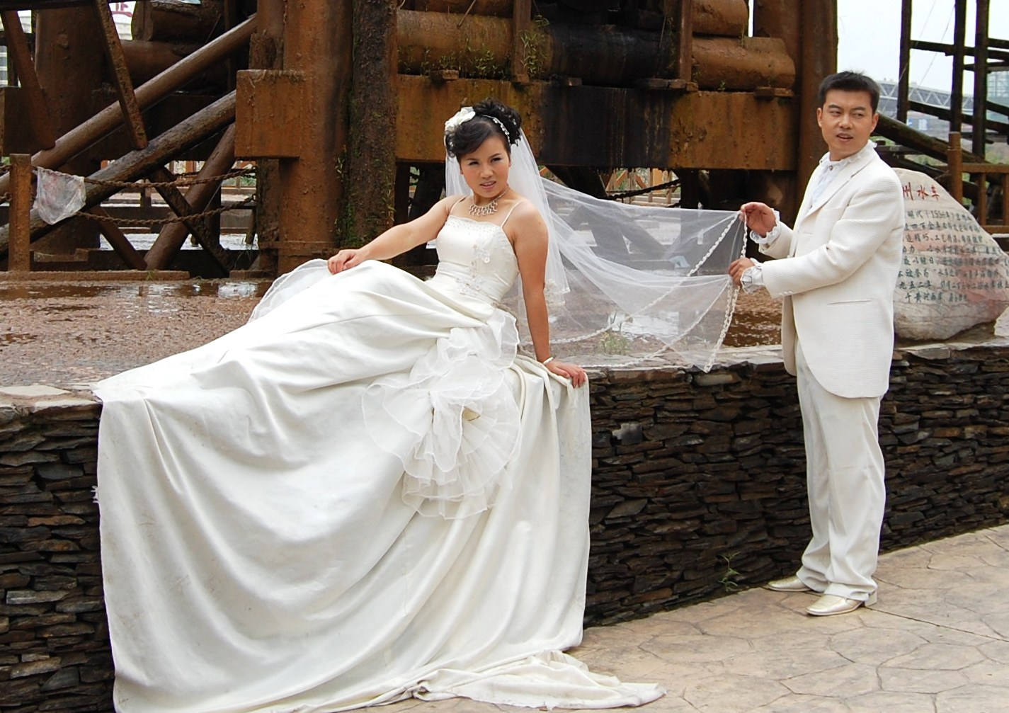 Wedding in Lanzhou, China